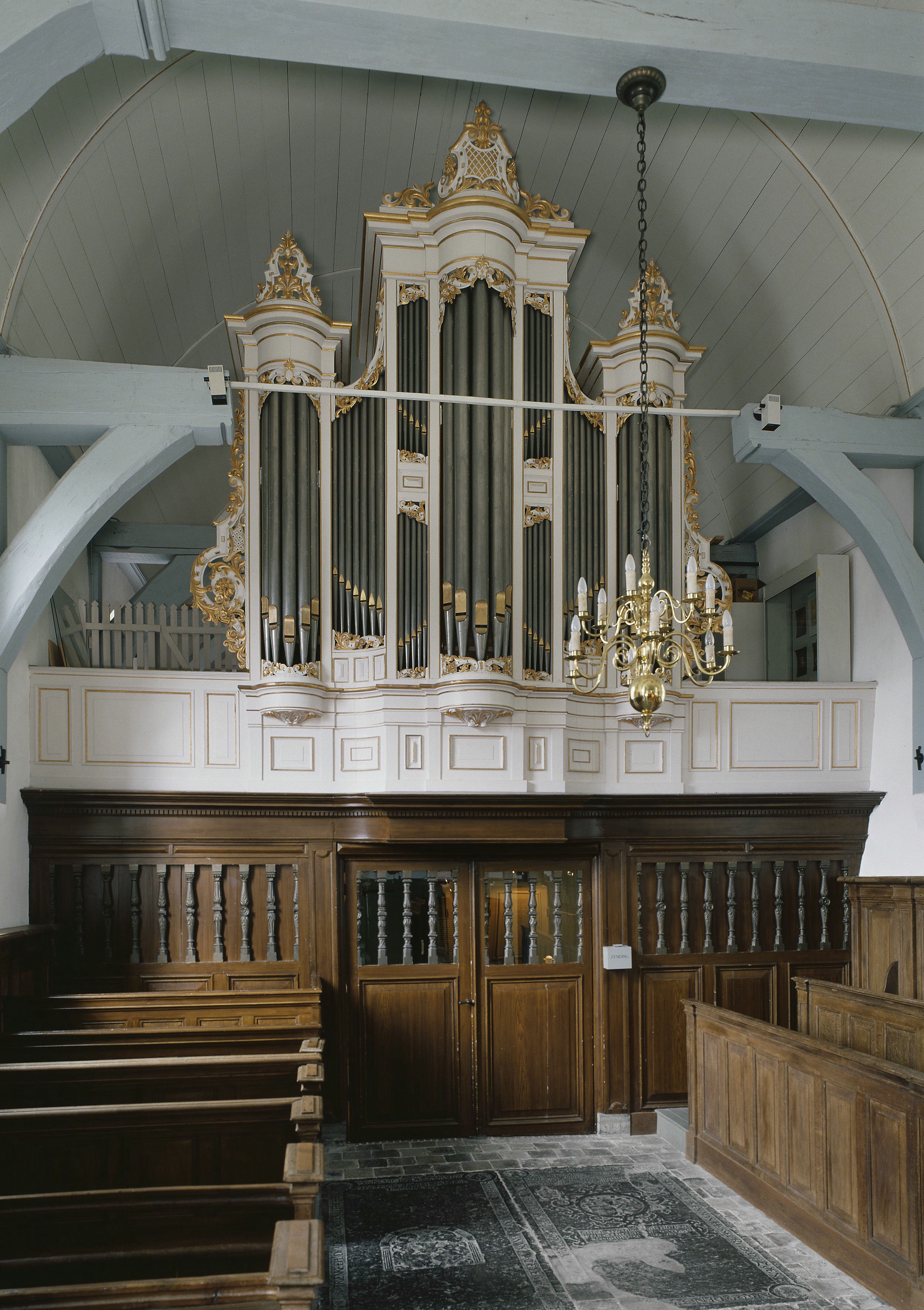 Nederlands Hervormde Kerk: Interieur, aanzicht orgel, orgelnummer 137 (opmerking: Gefotografeerd voor Het Historische Orgel in Nederland 1878-1886, Bladzijde 114)